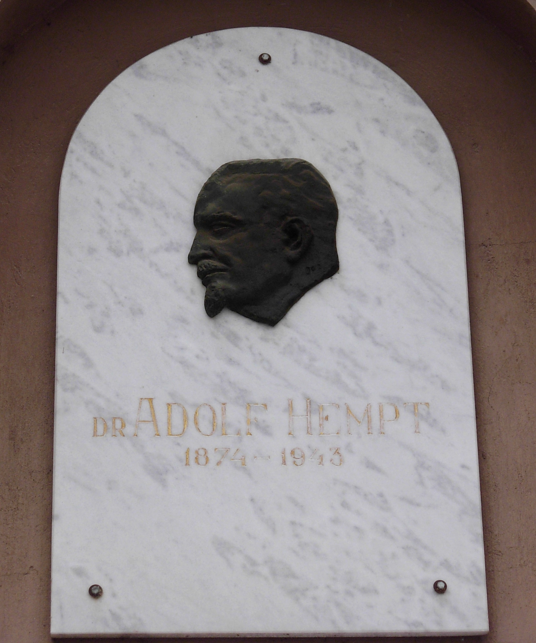 Spomen ploča dr Adolfu Hemptu (1874-1943) na zgradi Pasterovog zavoda u Novom Sadu. Rad dr Vladimira Jokanovića.